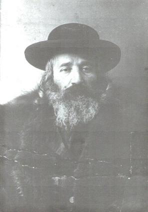 רבי ישעילה מטשחויב בנו של רבי חיים מצאנז